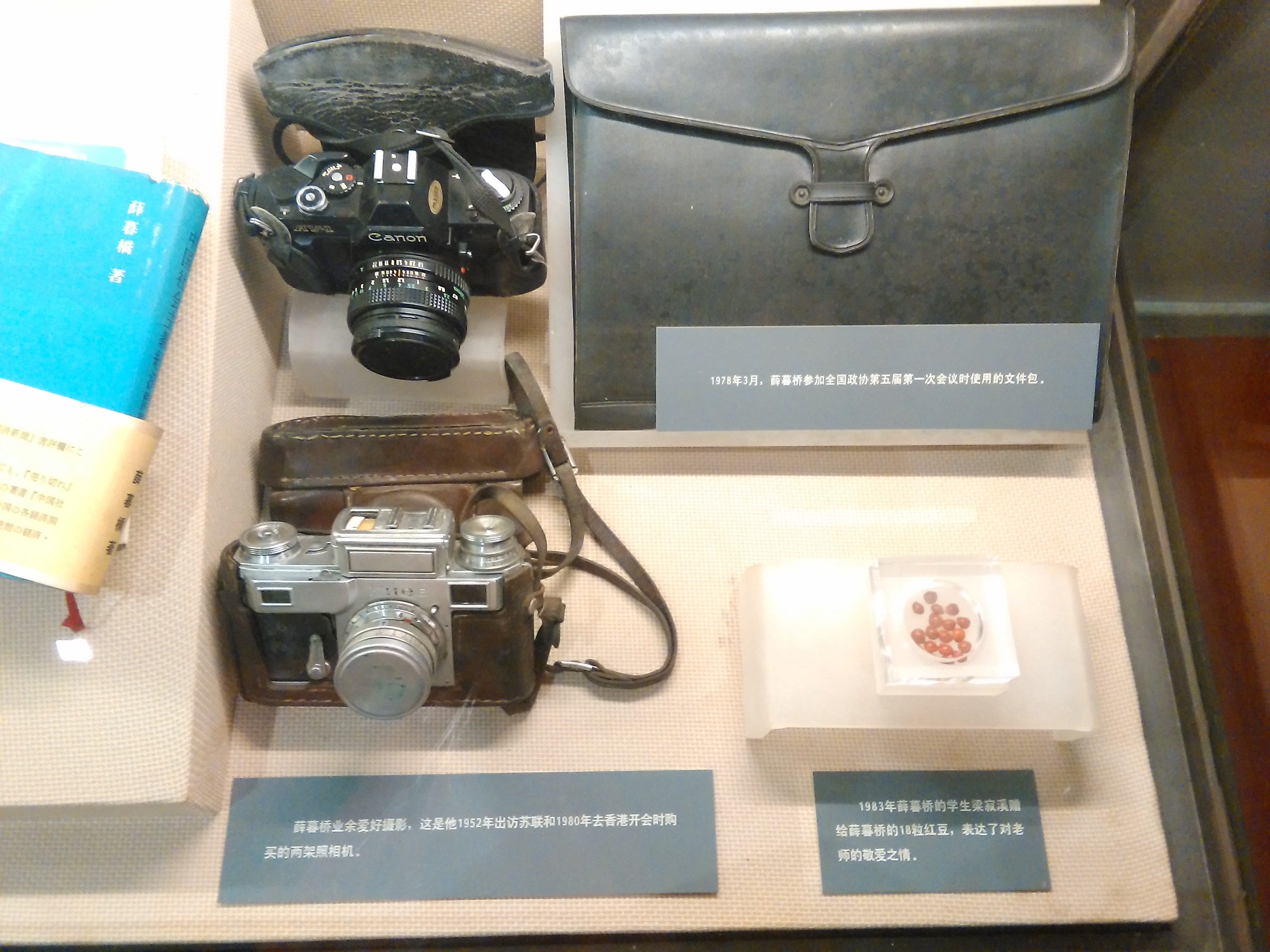 薛暮桥用过的相机、文件包等